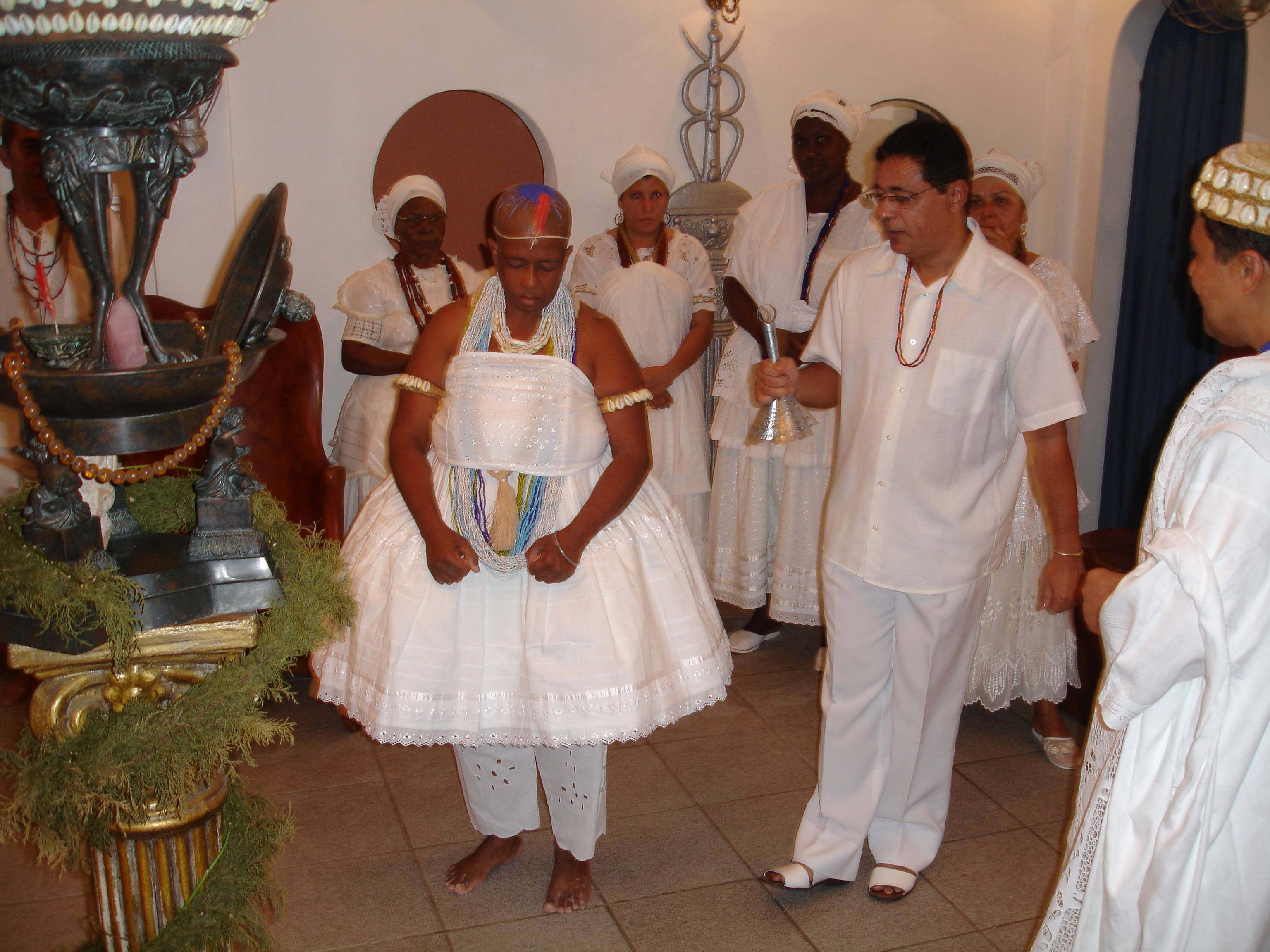 Orunkó. Nome de Iywao na feitura de santo. Orossi, Salvador Bahia.